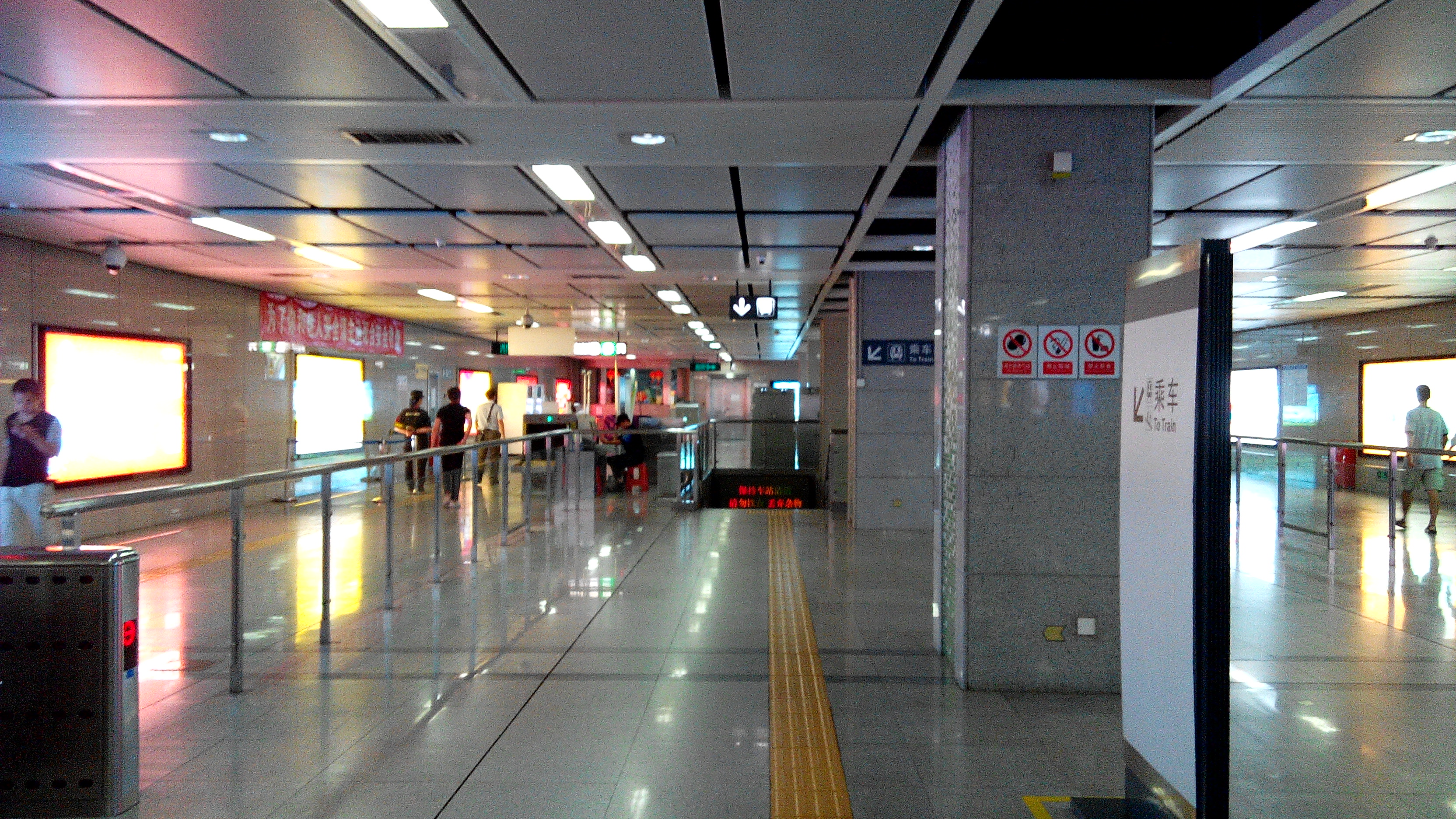 深圳地铁一号线 香蜜湖站大堂